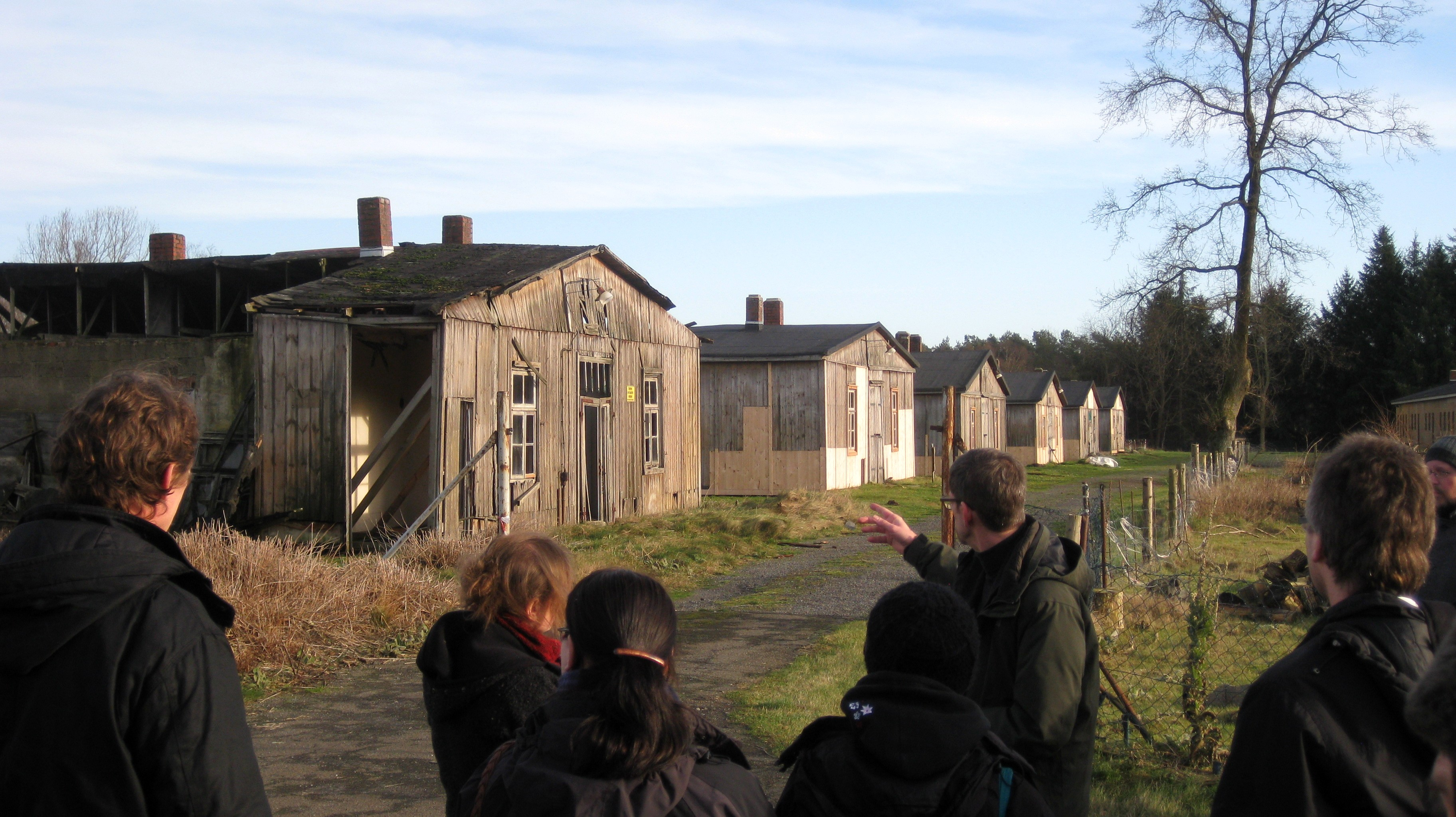 Baracken des ehemaligen STALAG X B / Sabdbostel